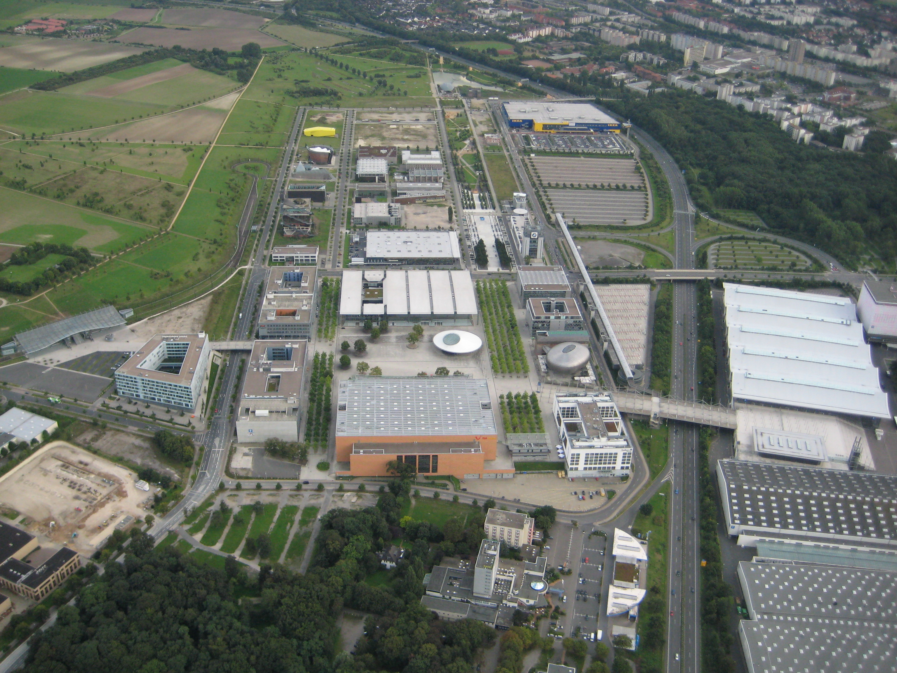 Gelände der Expo 2000 in Hannover im Jahr 2007